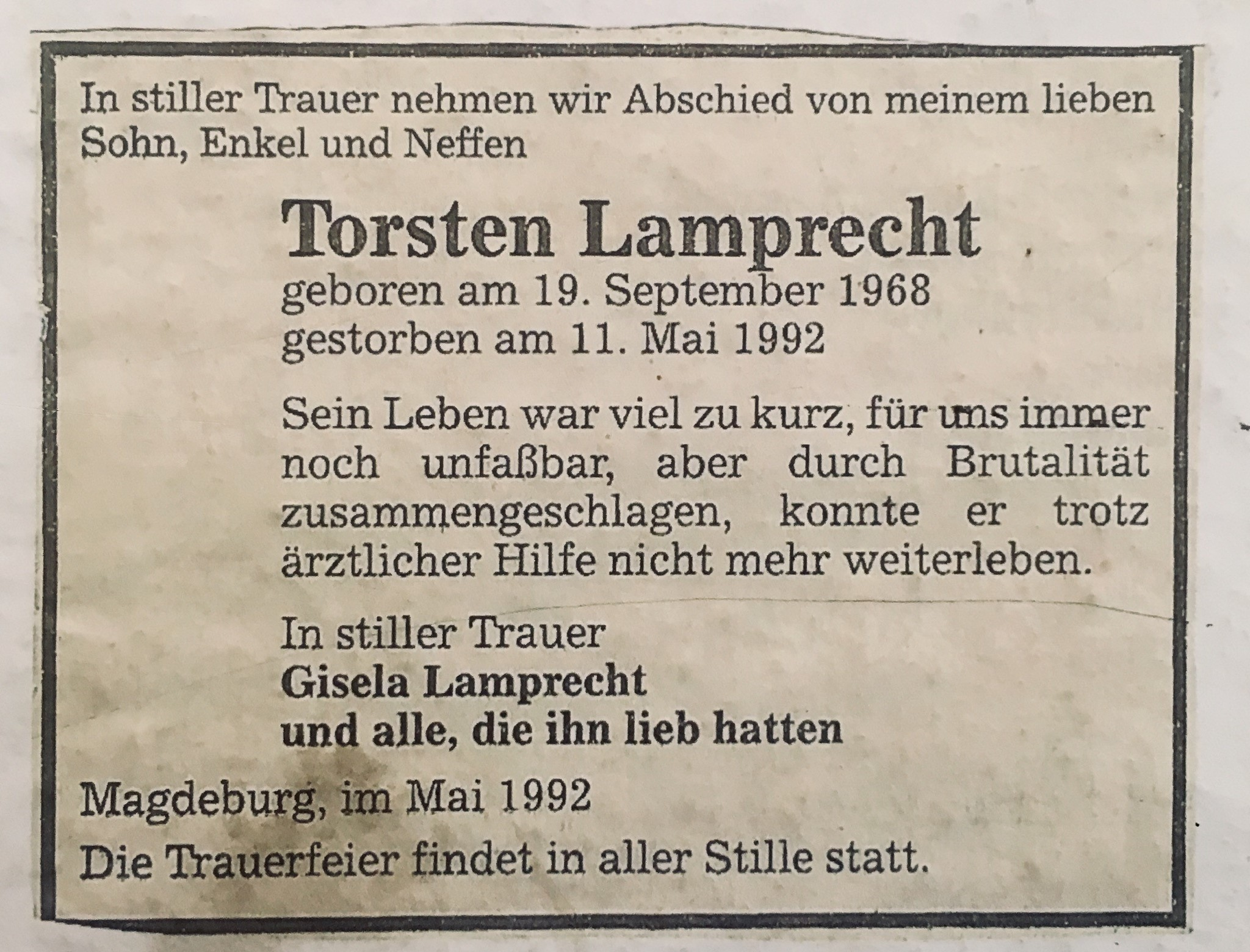 Traueranzeige des am 11. Mai 1992 von Neonazis in Magdeburg ermordeten Torsten Lamprecht.